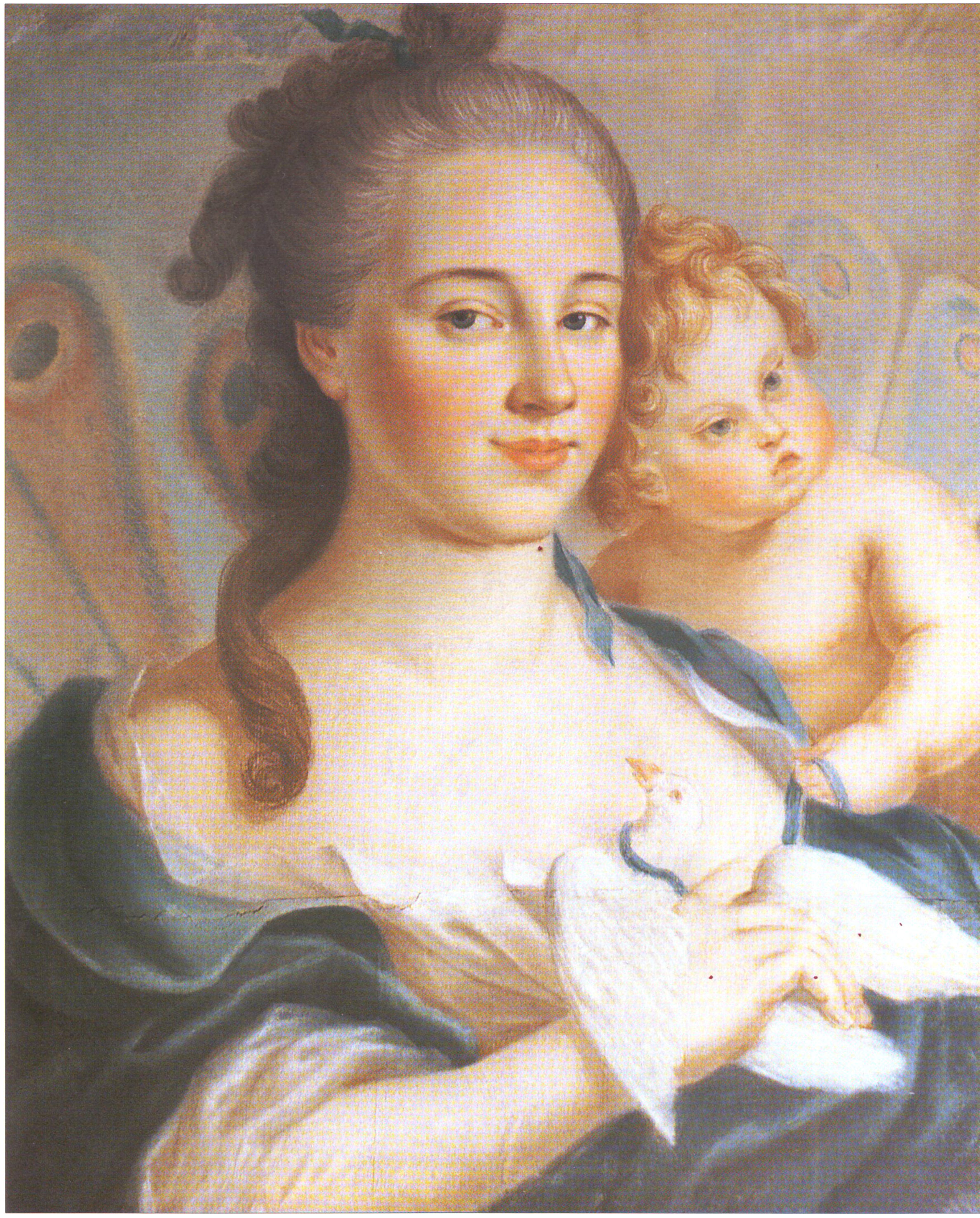 Жан де Самсуа. Портрет А.Н. Нарышкиной - "Воздух". Анна Никтична Нарышкина (1730-1820), урожденная Румянцева, дочь Н.И. Румянцева от брака с М.В. Мещерской. Фрейлина. С 1749 жена А.А. Нарышкина (1726-1795)